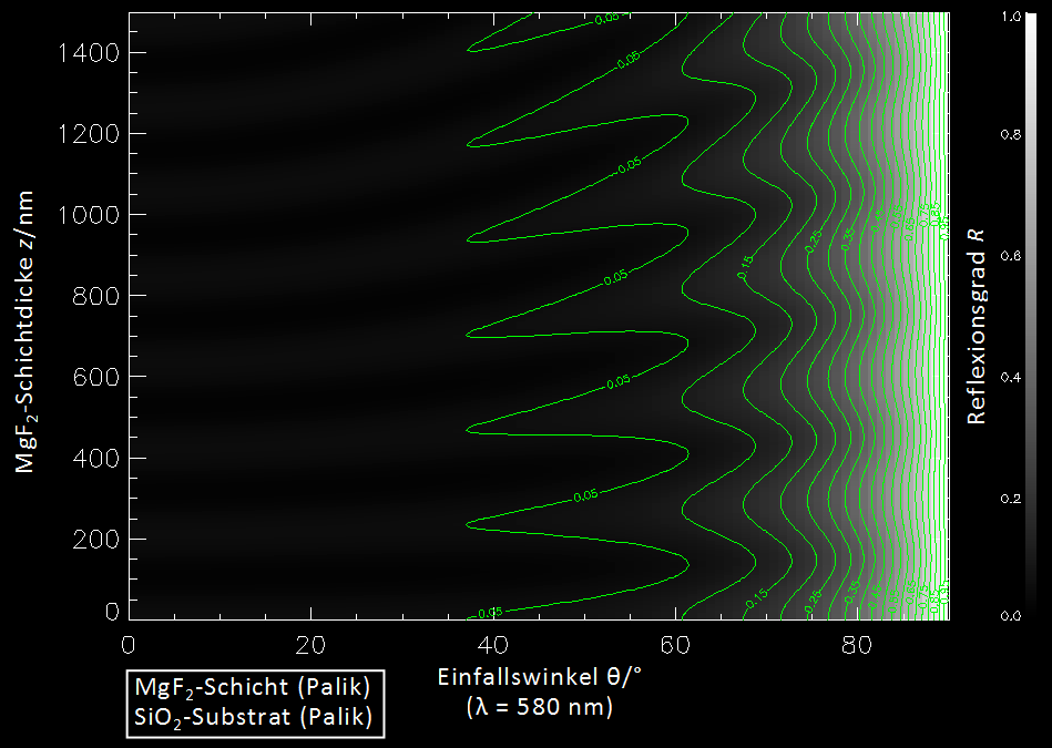 Reflexionsgrad für Licht der Wellenlänge 580 nm in Abhängigkeit vom Einfallswinkel und der Dicke einer Magnesiumfluorid-Schicht (MgF2) auf einem Siliciumdioxidsubstrat. Materialdaten laut Palik, Handbook of Optical Constants, aus der IMD4.1.1-Datenbank. Erstellt mit IMD 4.1.1 und IMDXPLOT.